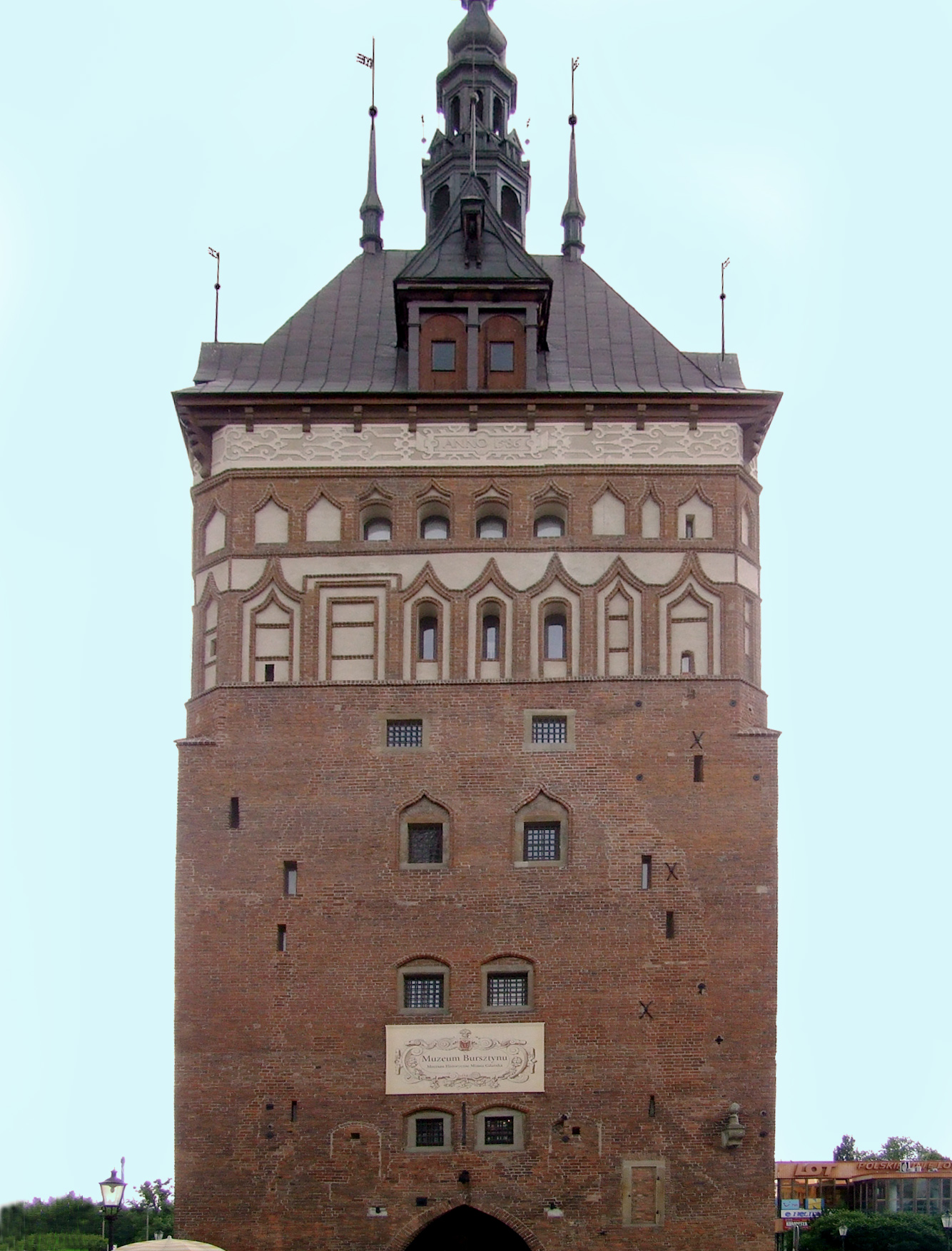 Wieża Więzienna, Targ Węglowy - powstała jako element obwarowania Głównego Miasta w Gdańsku, XIV, XVII. Razem z Katownią i łączącą je tzw. Szyją stanowi zespół przedbramia (barbakan) ul. Długiej.